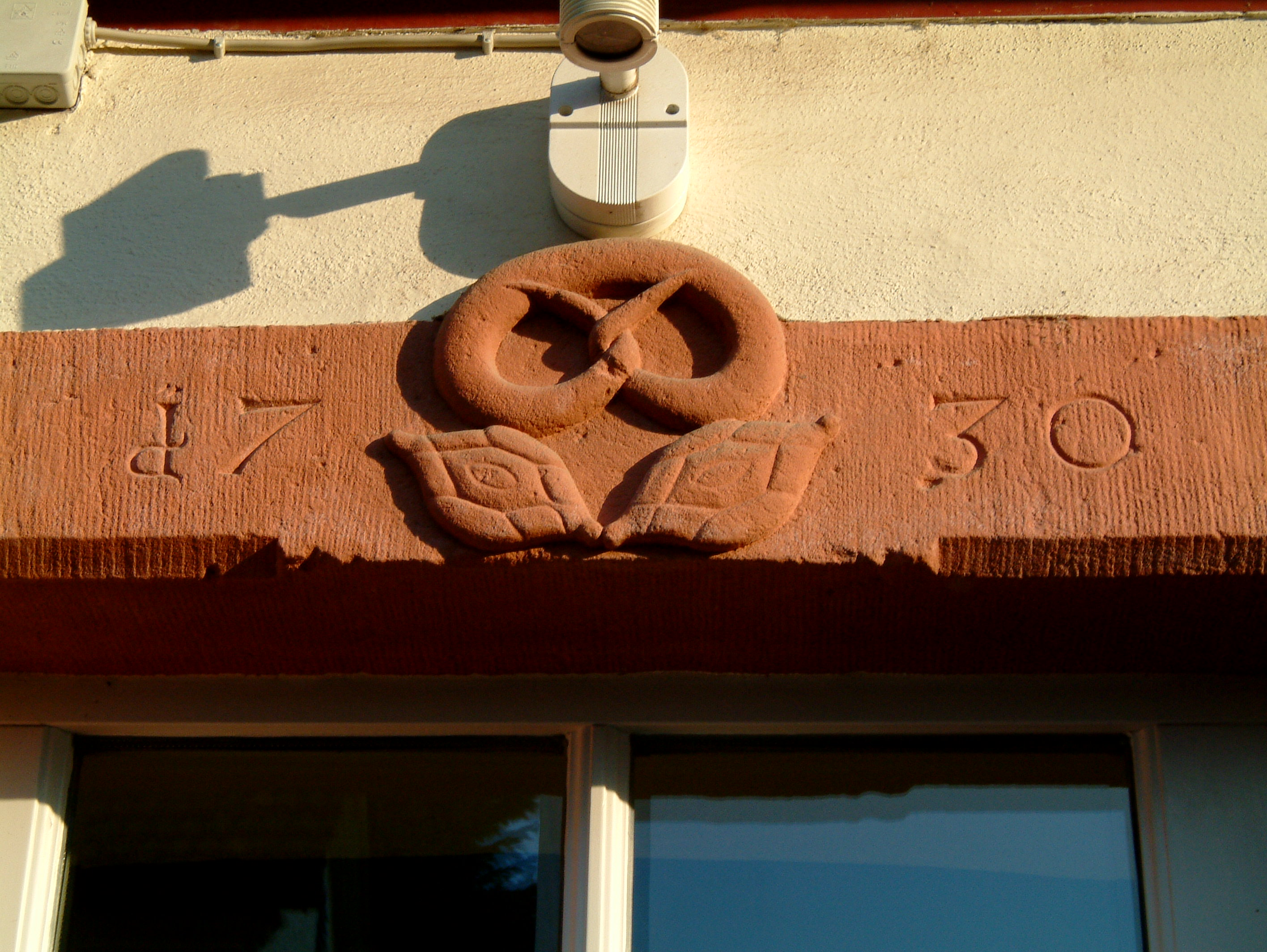 Backhaus (Jahreszahl 1730), Herrengasse 51 zu Dirmstein